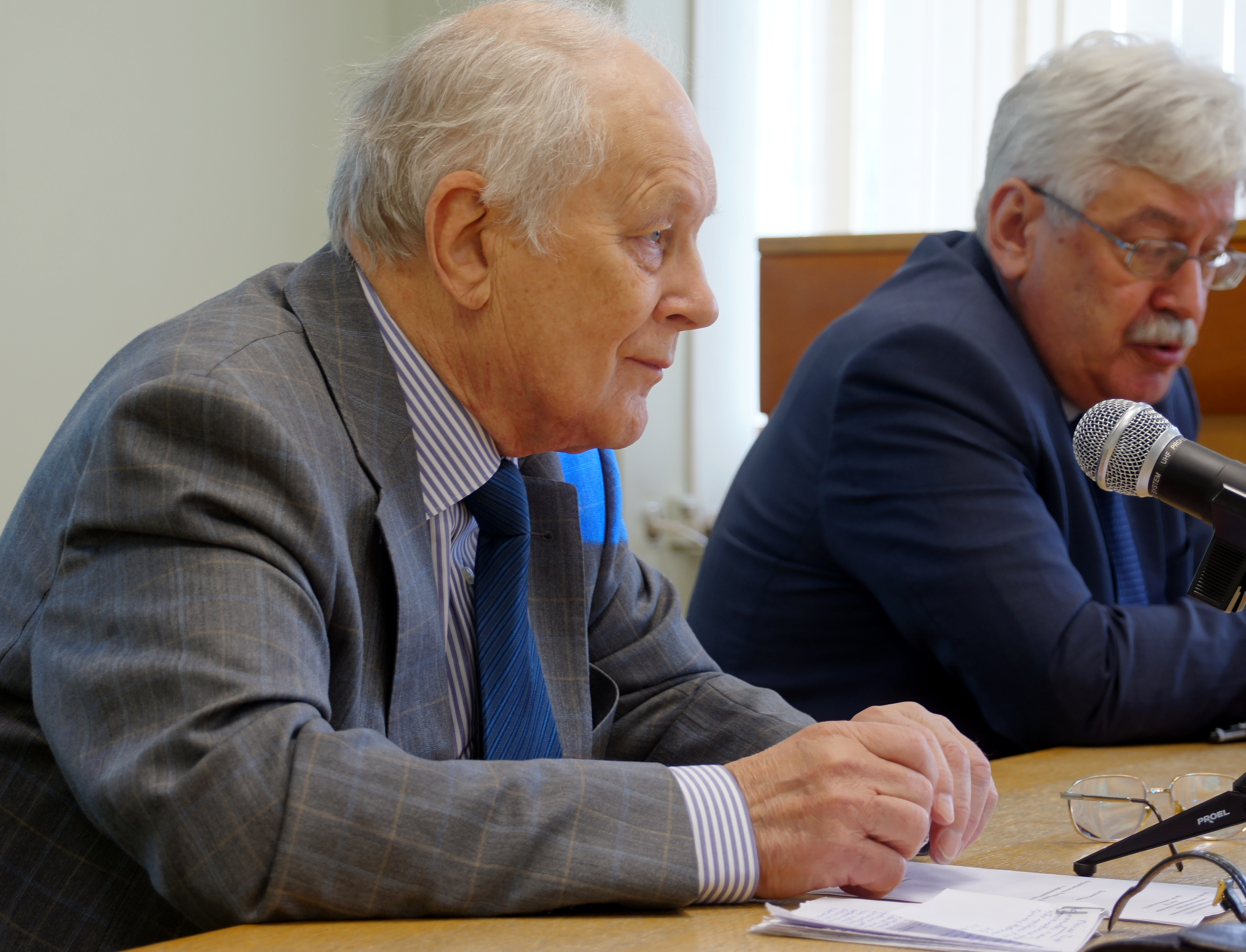 А. Н. Сахаров и Ю. С. Пивоваров - ведущие конференции в ИНИОН РАН